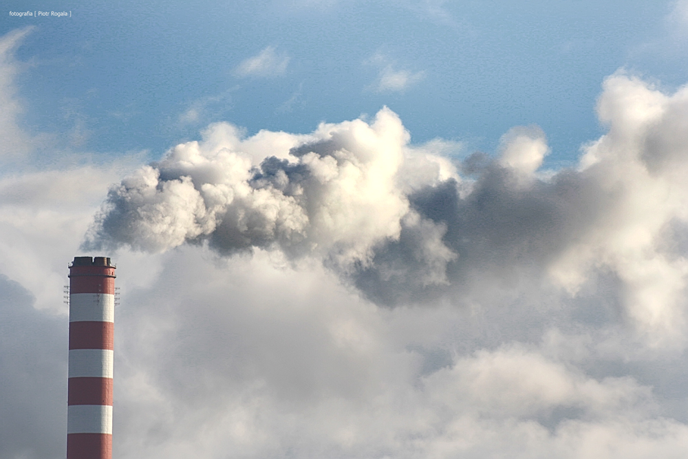 Elektrownia Opole